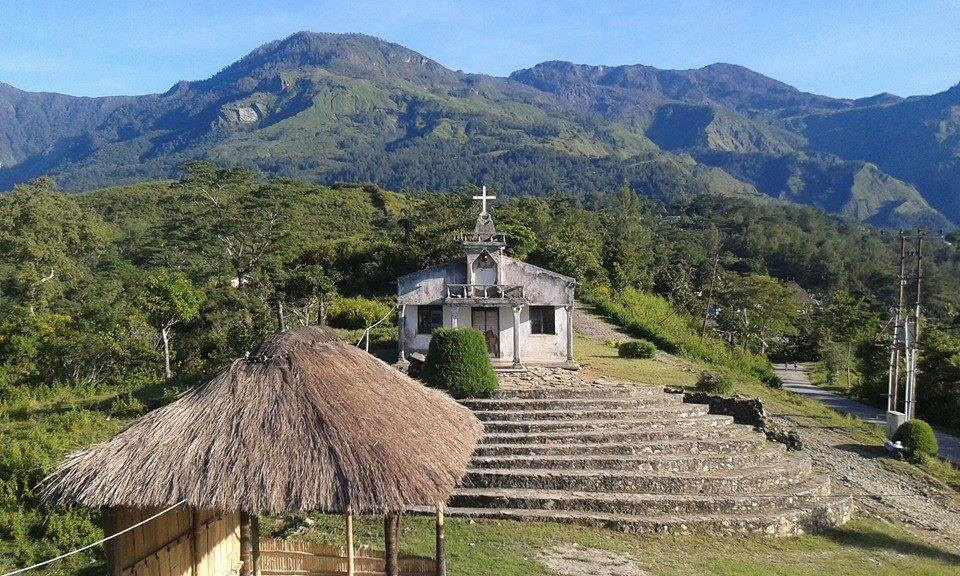 Ainaro